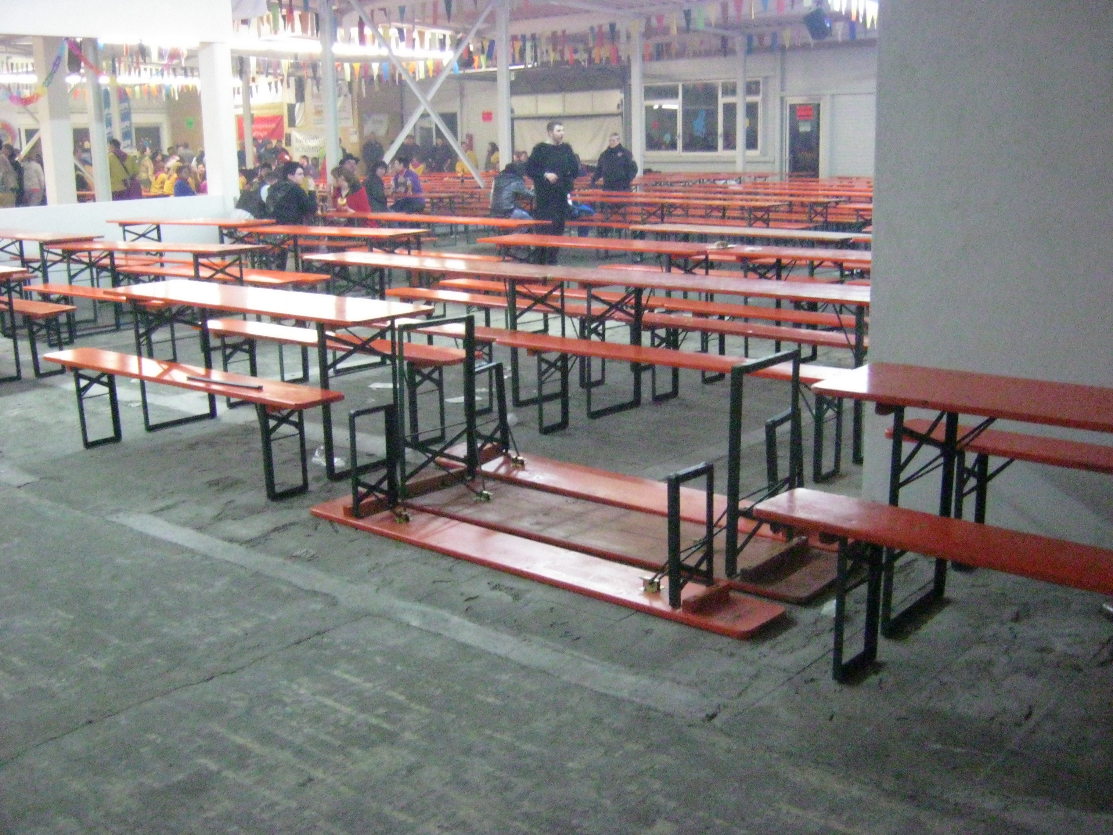 Narrentreffen in Bärenthal